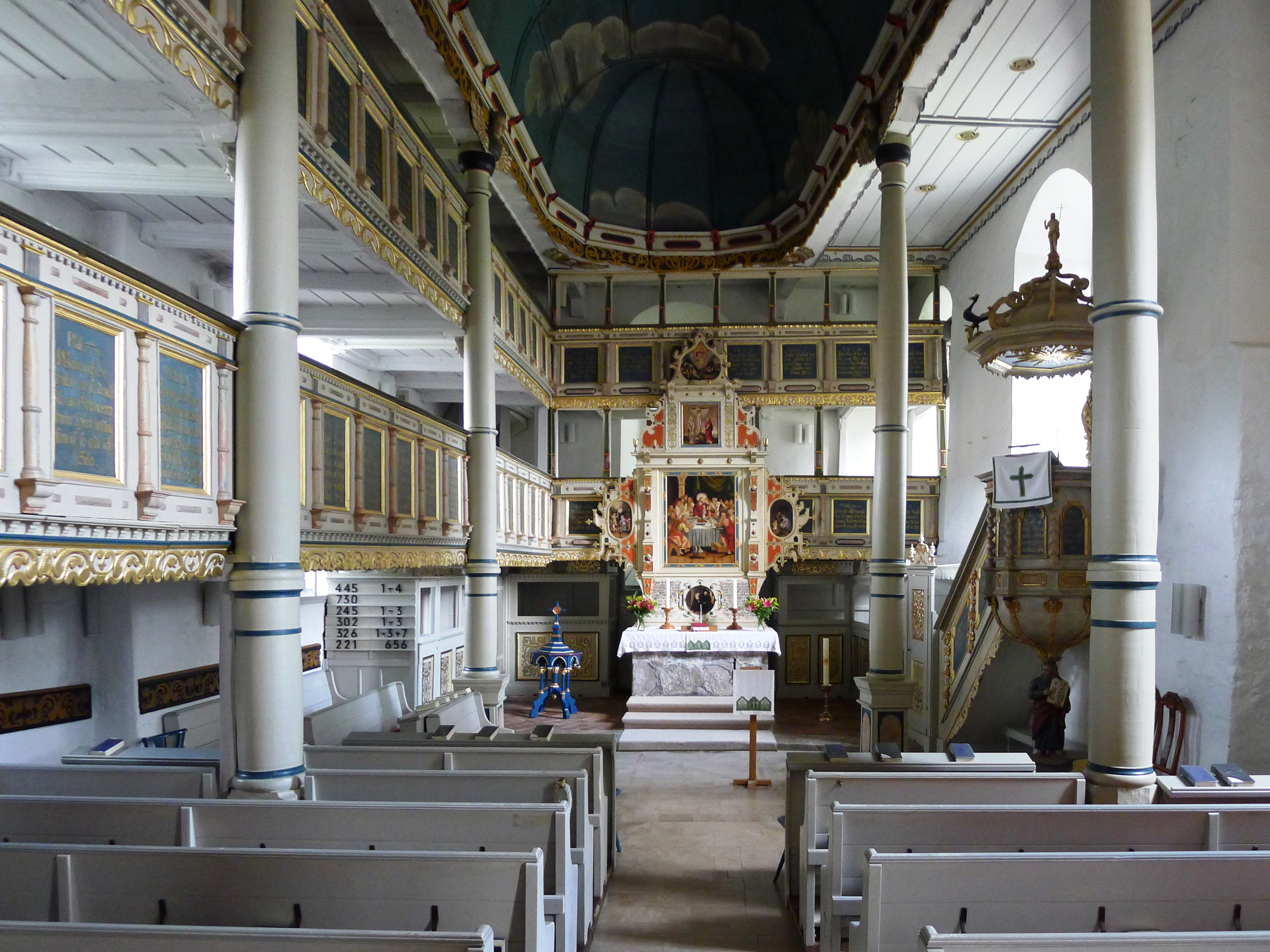 Der Fußboden des Kirchenschiffs fällt zum Altar hin ab.